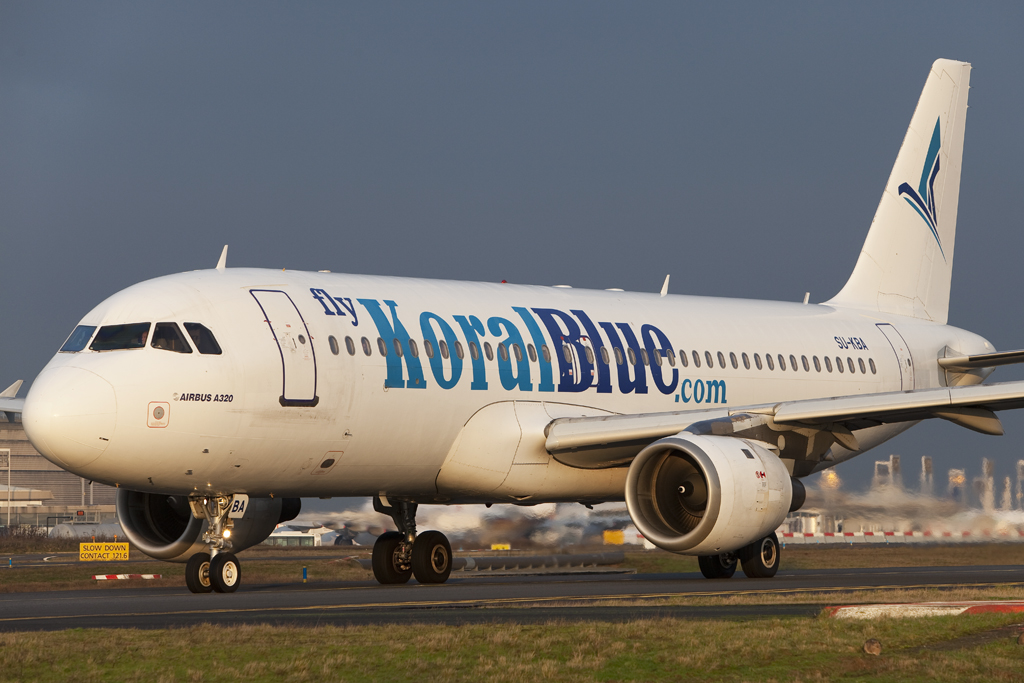 SU-KBA A320 KoralBleu